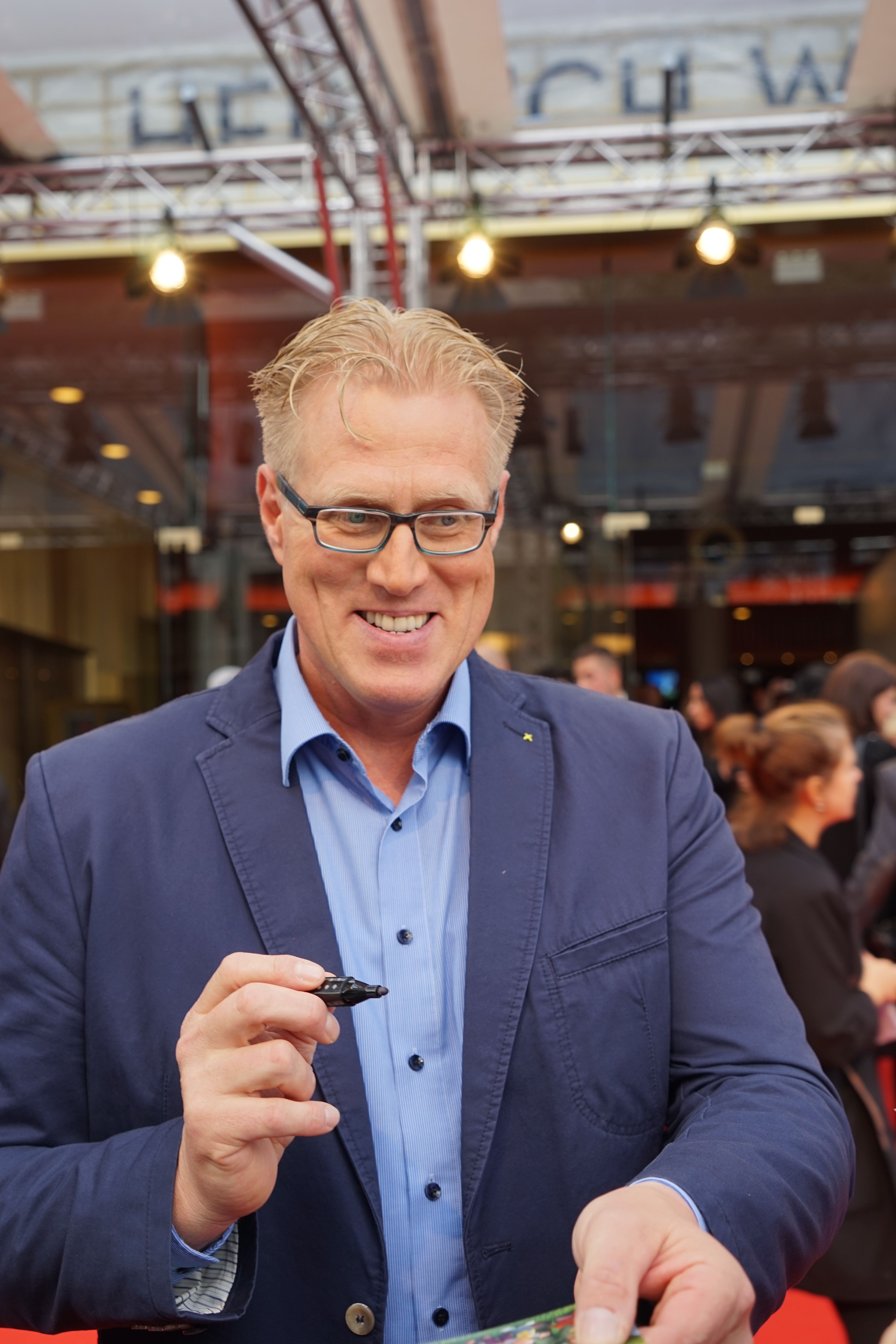 Norbert Heisterkamp bei der Premiere des Films "Der siebte Zwerg" am Zoopalast, 21. September 2014